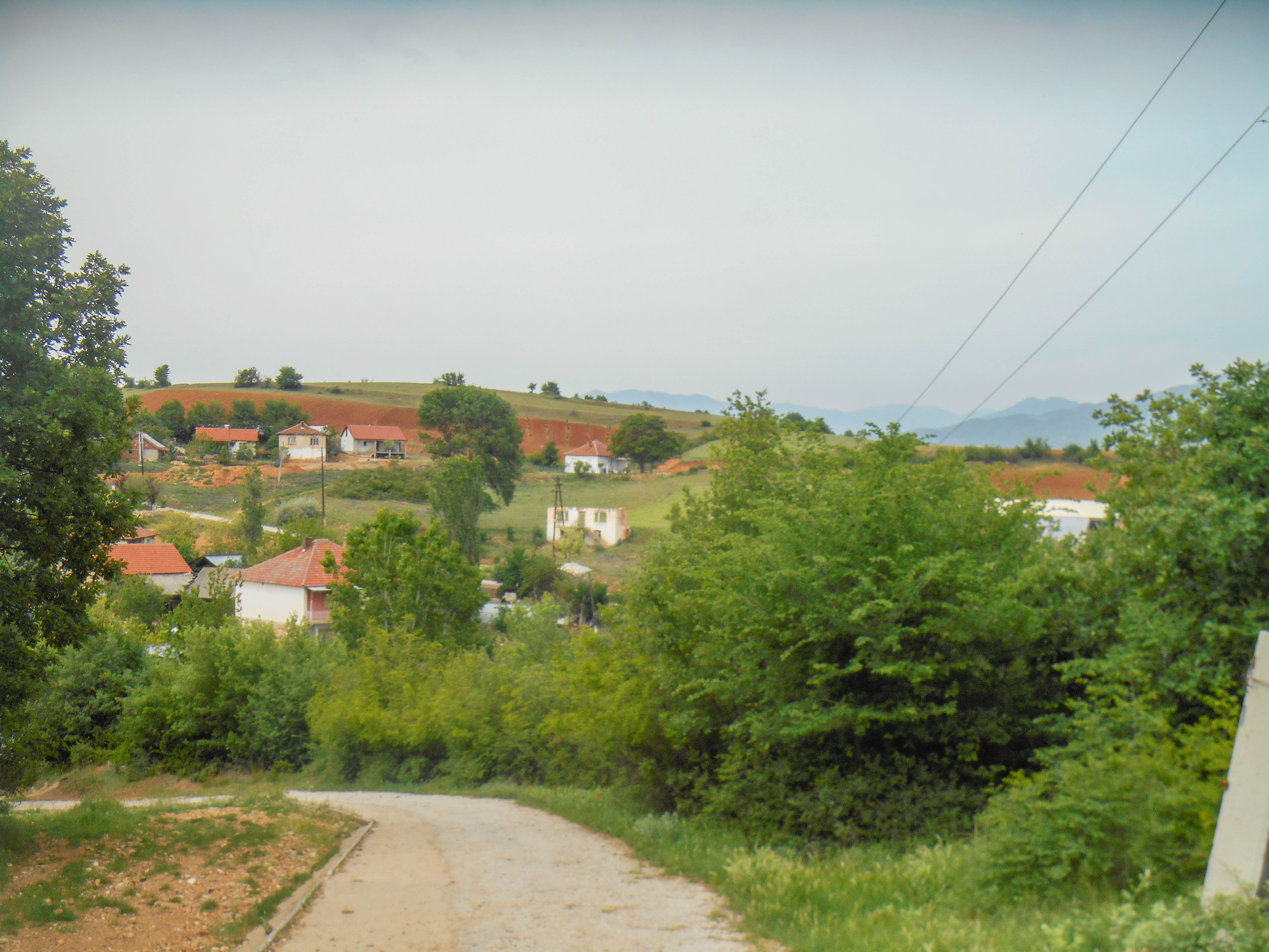 Владиевци - Општина Василево